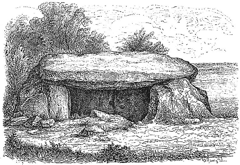 "La Pierre-Laye, dolmen de Vaurezis".